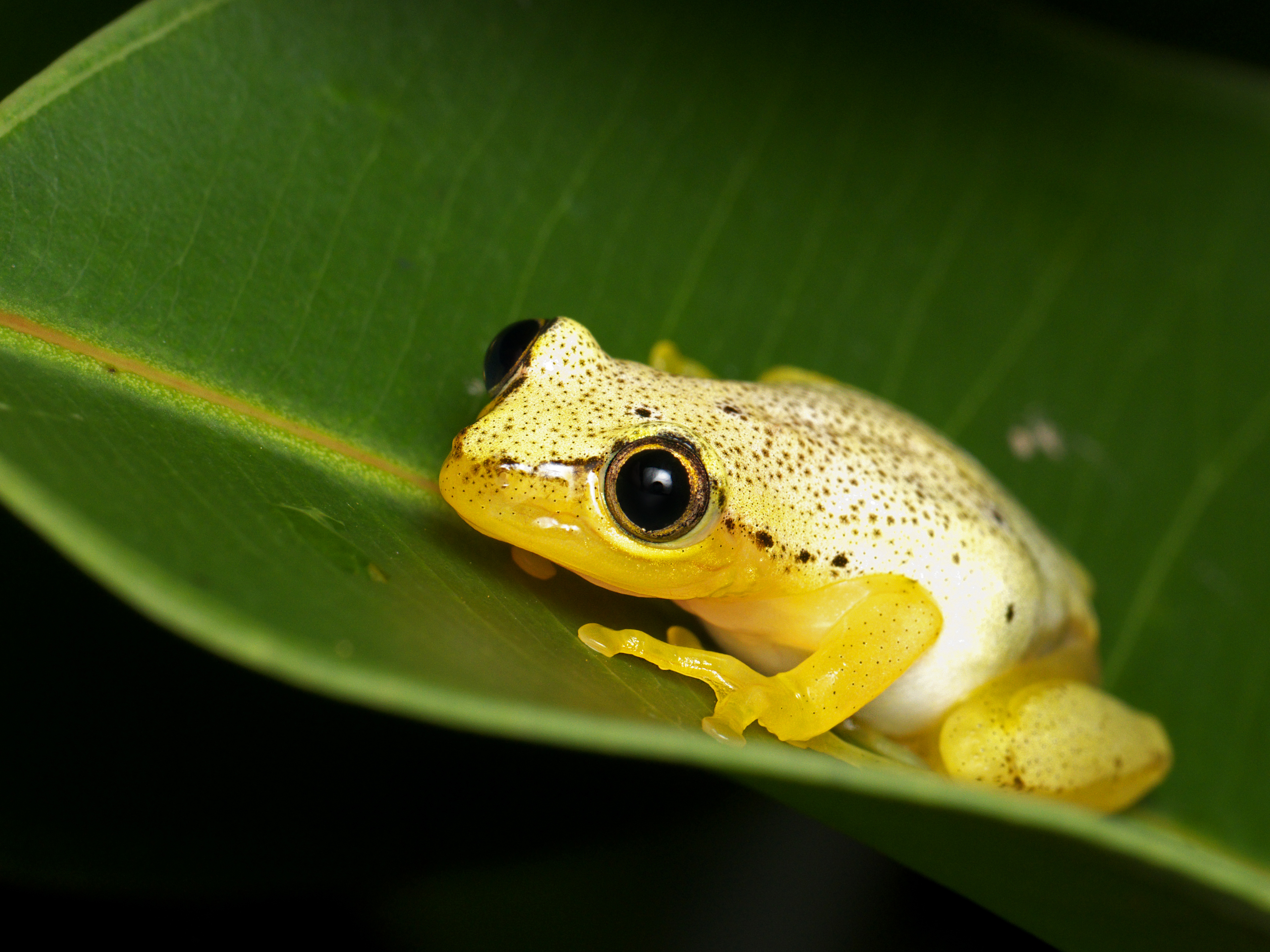 Panasonic GX7 + Leica DG Macro-Elmarit 45mm F2.8 ASPH OIS